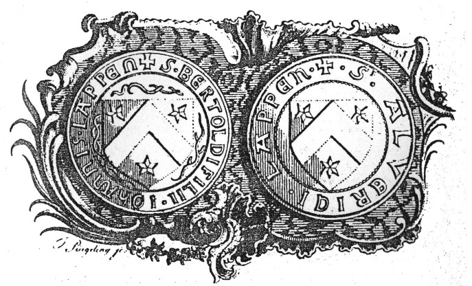 Wappen der Familie Lappe aus Hadeln, 1362, gestochen von Gottfried Christian Pingeling oder Thomas Albrecht Pingeling